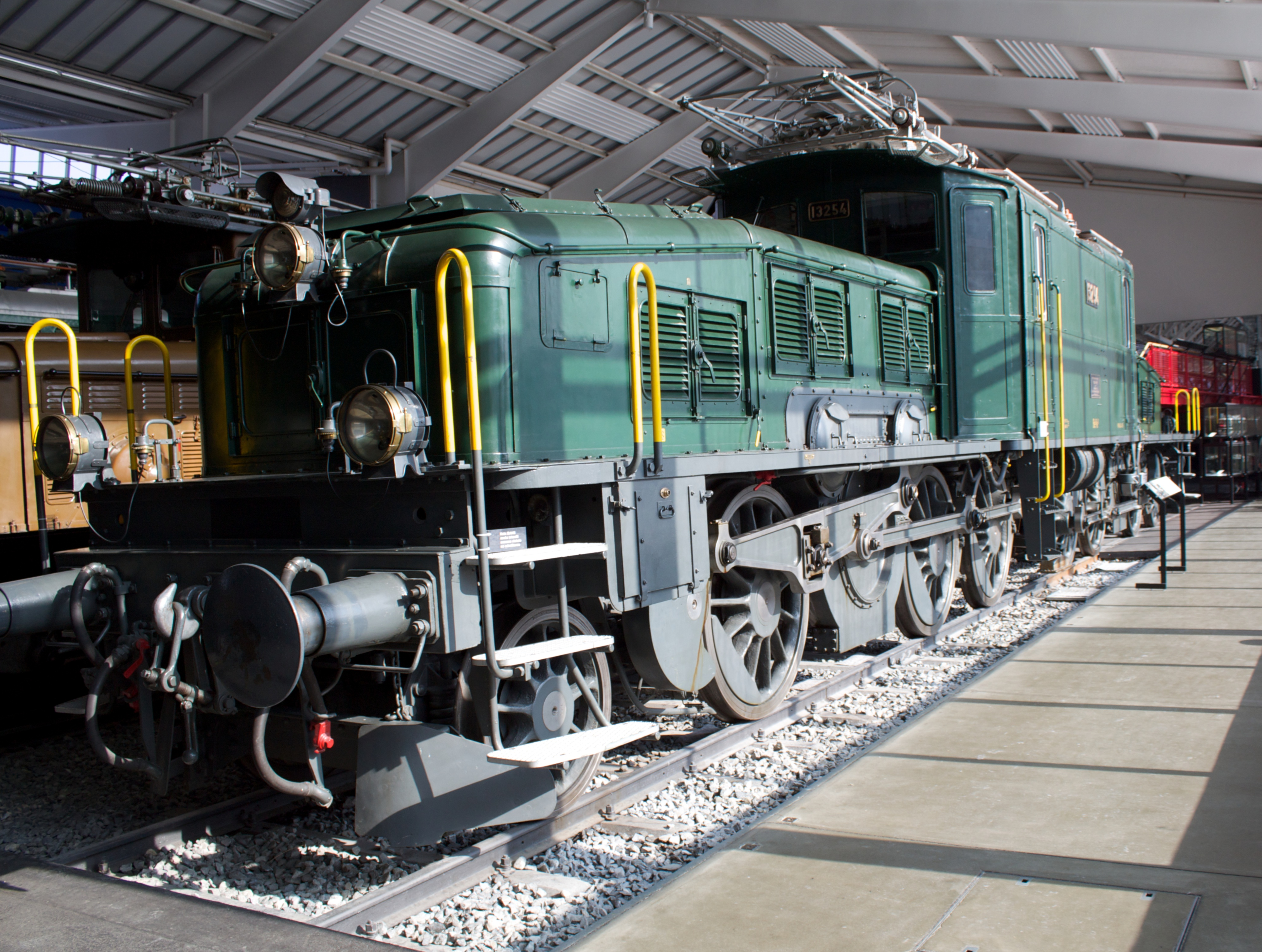 പഴയ തീവണ്ടി, സ്വിസ്സ് പുരാവസ്തു വകുപ്പിലെ ഒരു കാഴ്ച